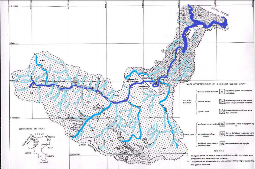 Mapa de ubicación de la Cuenca Hidrográfica San Juan de Micay